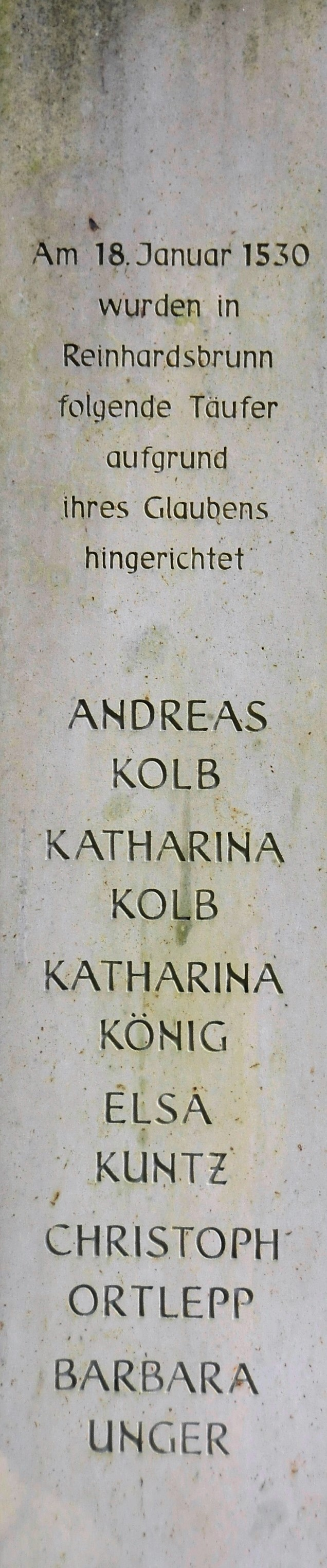 Gedenkstele für die 1530 in Reinhardsbrunn hingerichteten Täufer